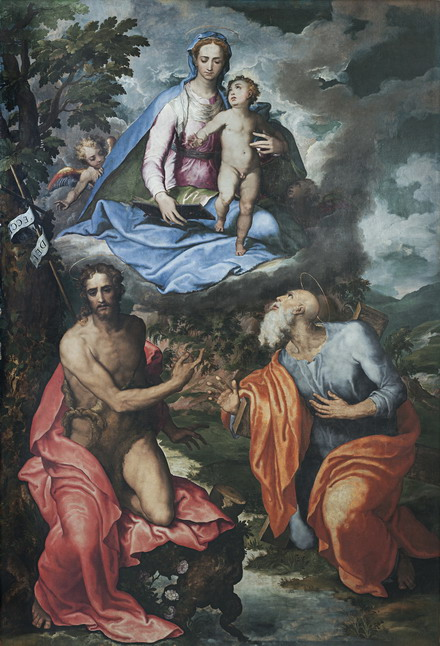 Marco Pino, Madonna and Child with Saints, 1557.jpg